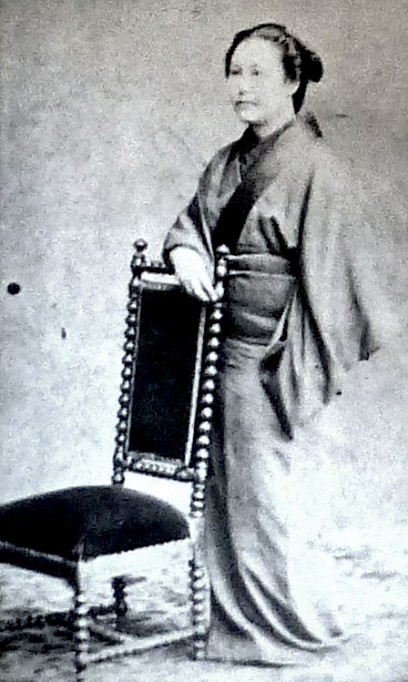 グラバー・ツル（英: Glover Tsuru、1851年 - 1899年3月23日）とは幕末に長崎を拠点として活躍した英国商人トーマス・ブレーク・グラバー（Thomas Blake Glover）の妻。(Tsuru, the wife of Thomas Blake Glover.)